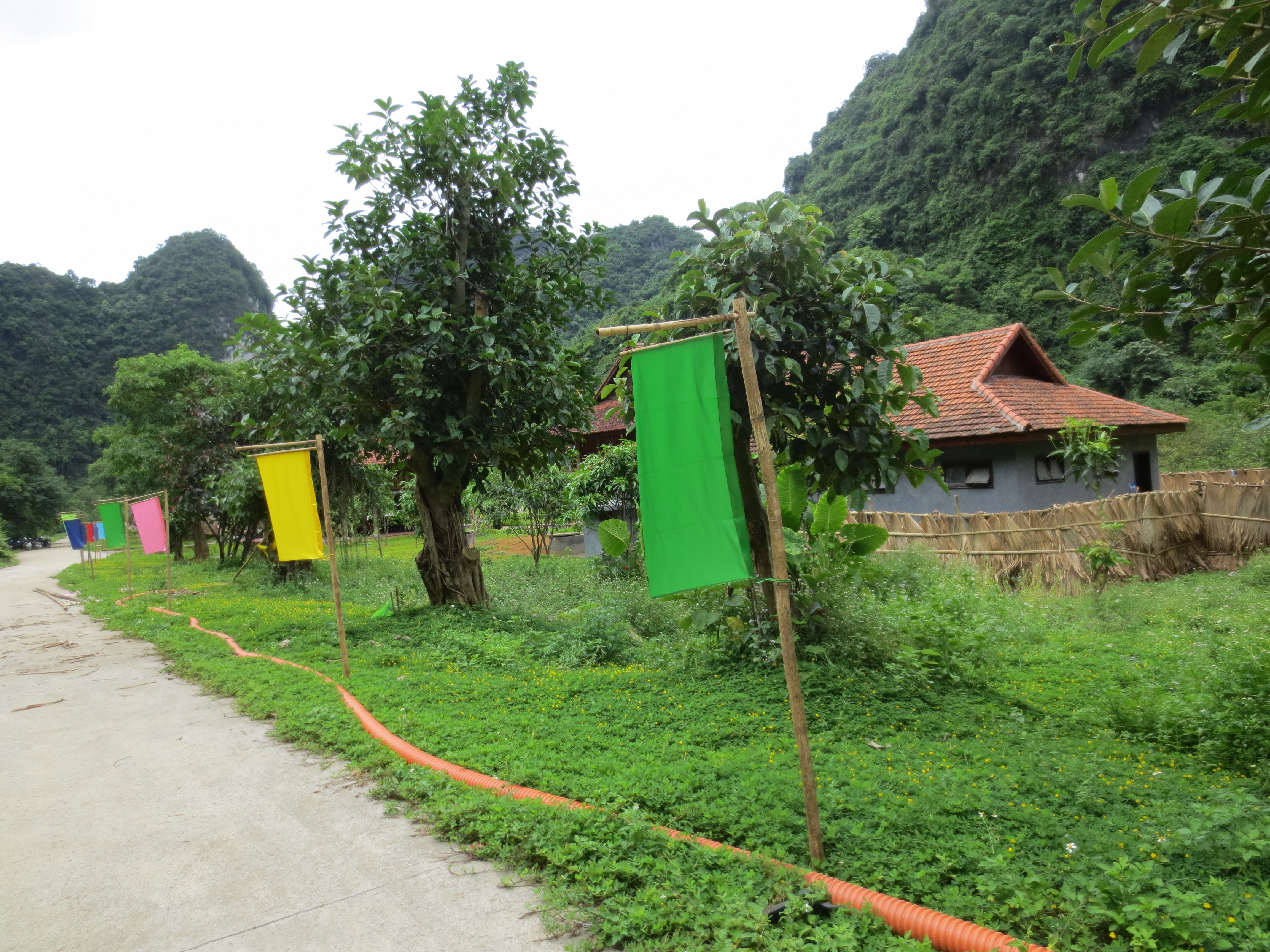 Khu du lịch sinh thái thung Ui ở Ninh Bình